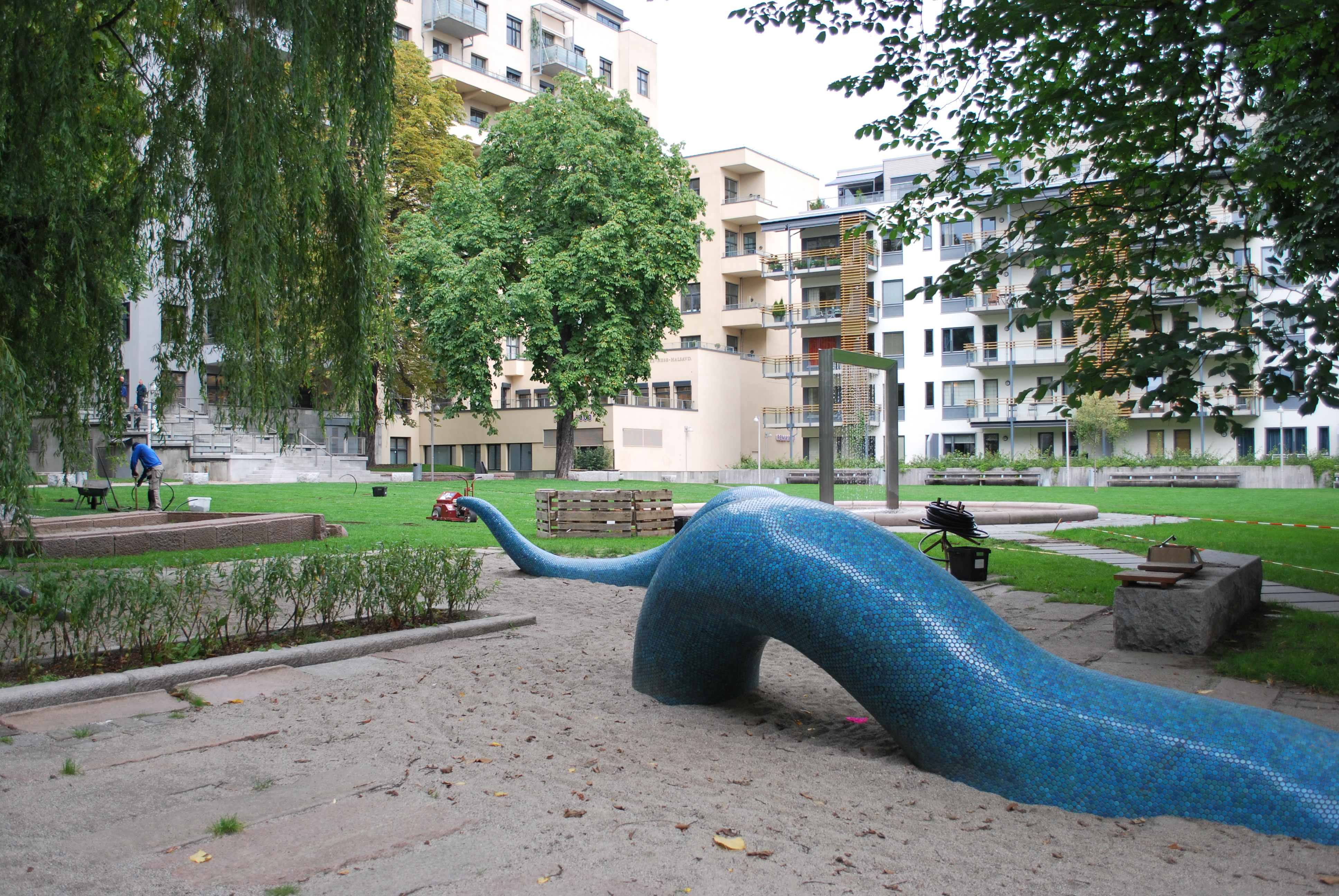 Sentralparken, Pilestredet park, Oslo